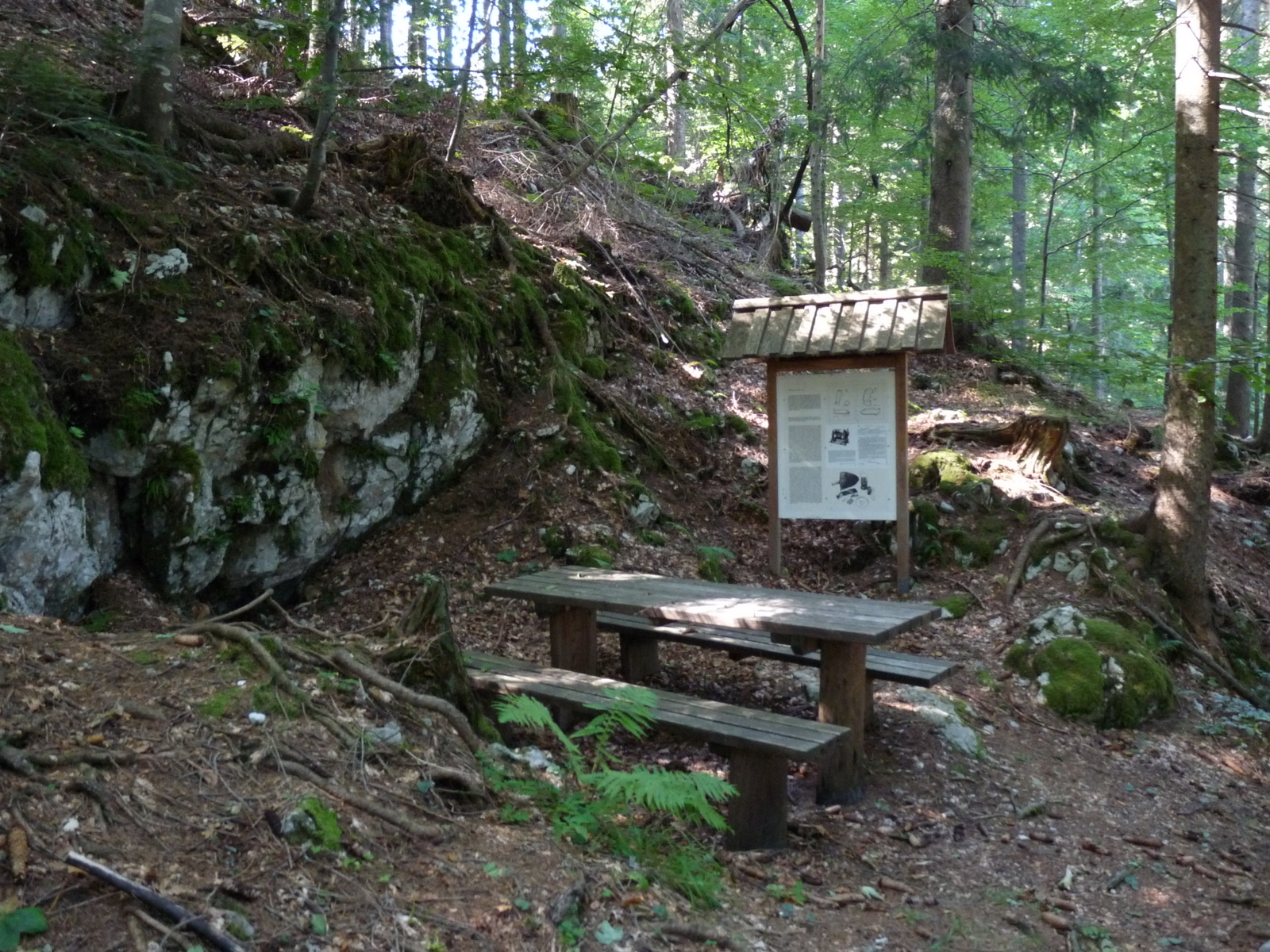 Tehnika Meta na Jelovici